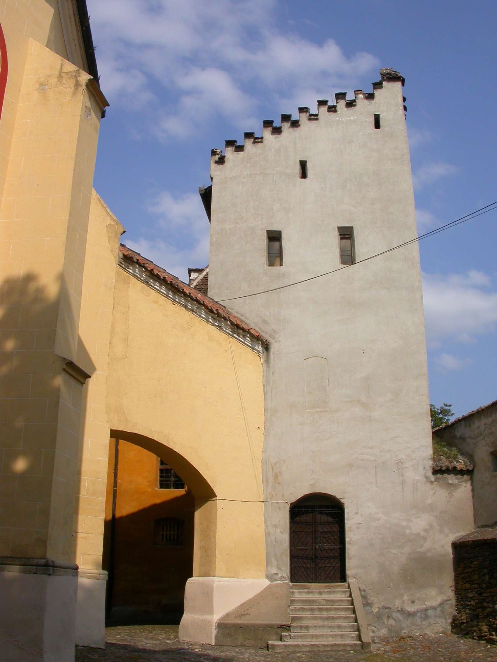 Ansamblul bisericii evanghelice fortificate ("Castelul") sec. XIII - XIX